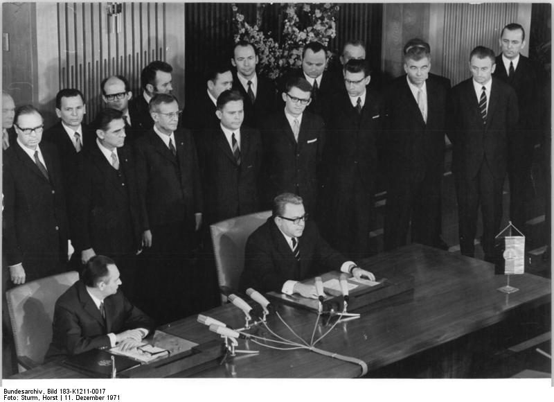 ADN-ZB Sturm 11.12.1971 Berlin-Transitabkommen zwischen der Regierung der DDR und der Regierung der BRD paraphiert Nach dem Akt der Paraphierung gab der Staatssekretär beim Ministerrat der DDR, Dr. Michael Kohl (r.), im Beisein des Stellvertreters des Ministers für Auswärtige Angelegenheiten der DDR, Dr. Ernst Scholz (1.R. stehend 3.v.l.), und des Leiters des Büros des Ministerrates der DDR, Dr. Rudi Rost (1.r. stehend 2.v.l.), eine Erklärung ab.